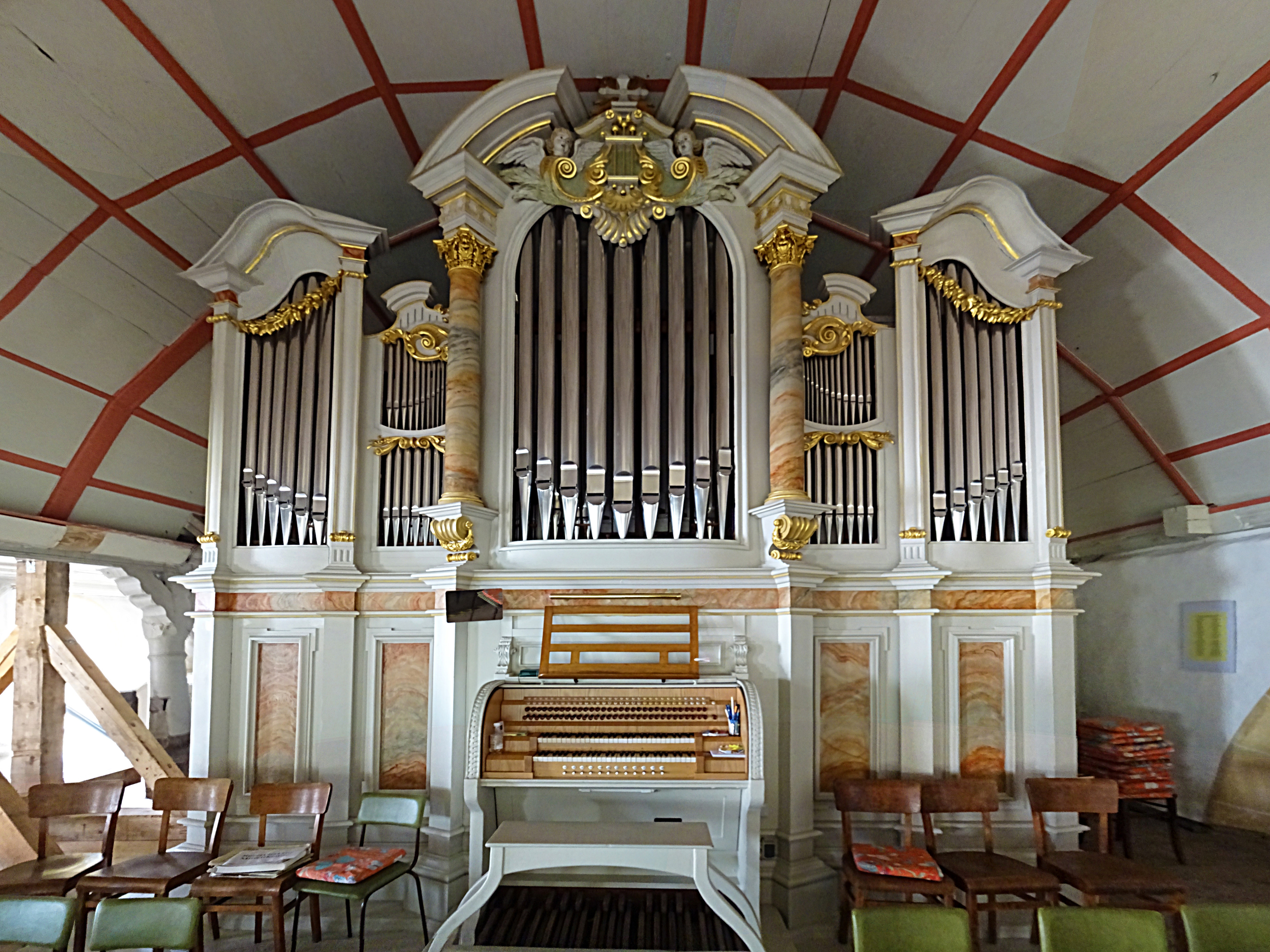 Orgel von Robert Knauf & Sohn (1895, IIP/27) in St. Marien Bleicherode[1]